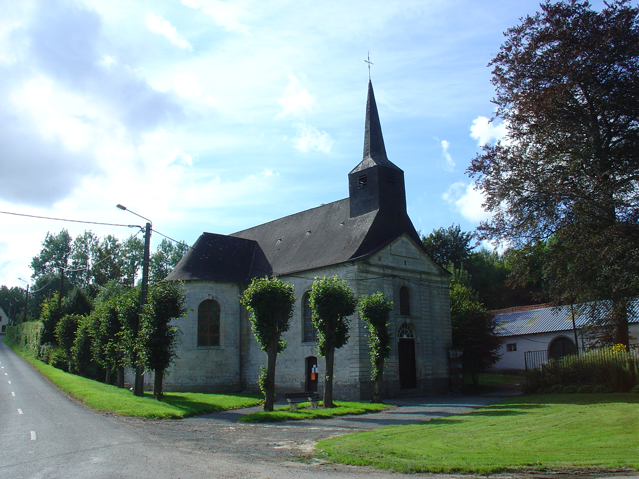 Église d'Equirre